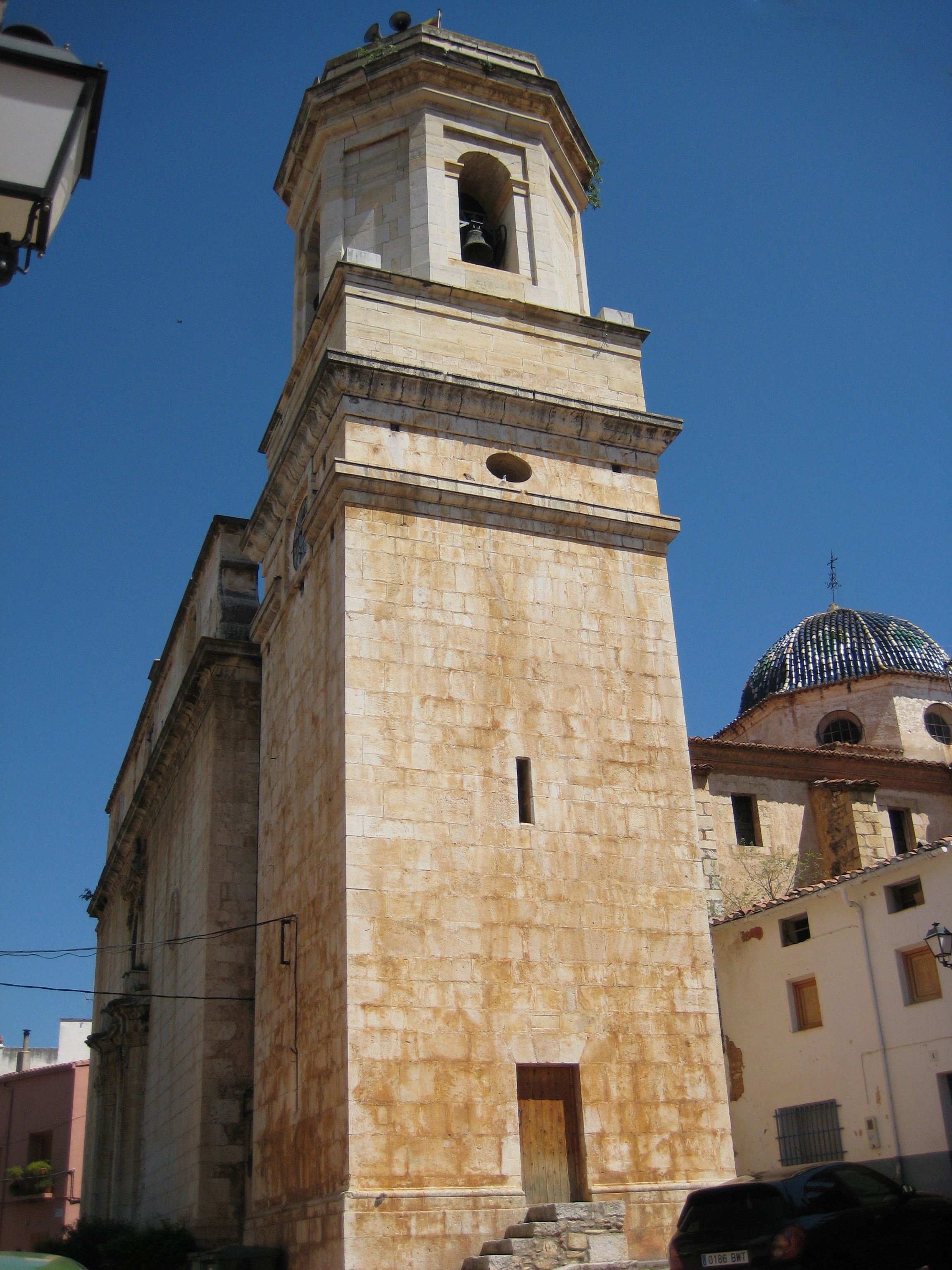 Campanar de l'església de l'Assumpció de les Coves de Vinromà (Plana Alta)